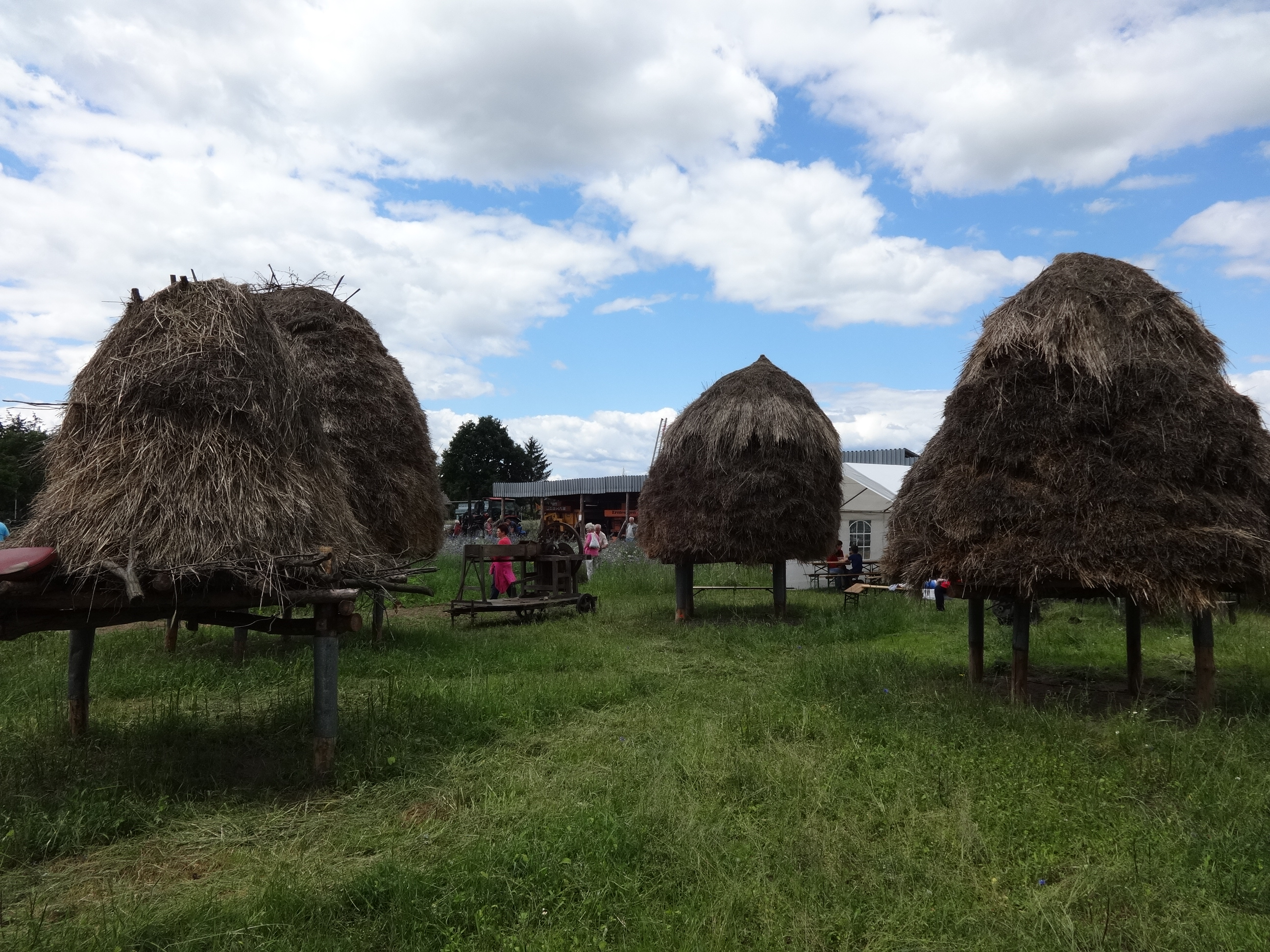 Impression von der Brandenburger Landpartie auf dem Gelände der Freunde alter Landmaschinentechnik in der Ackerstraße in Fredersdorf-Vogelsdorf (Landkreis MOL), Brandenburg